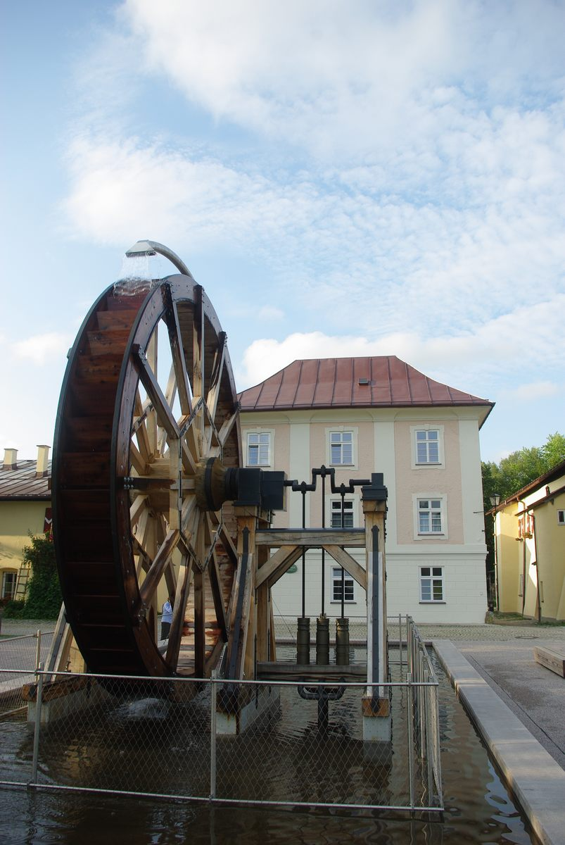 Nachbau einer Reiffenstuelschen Kolbendruckpumpe im Salinenpark Traunstein